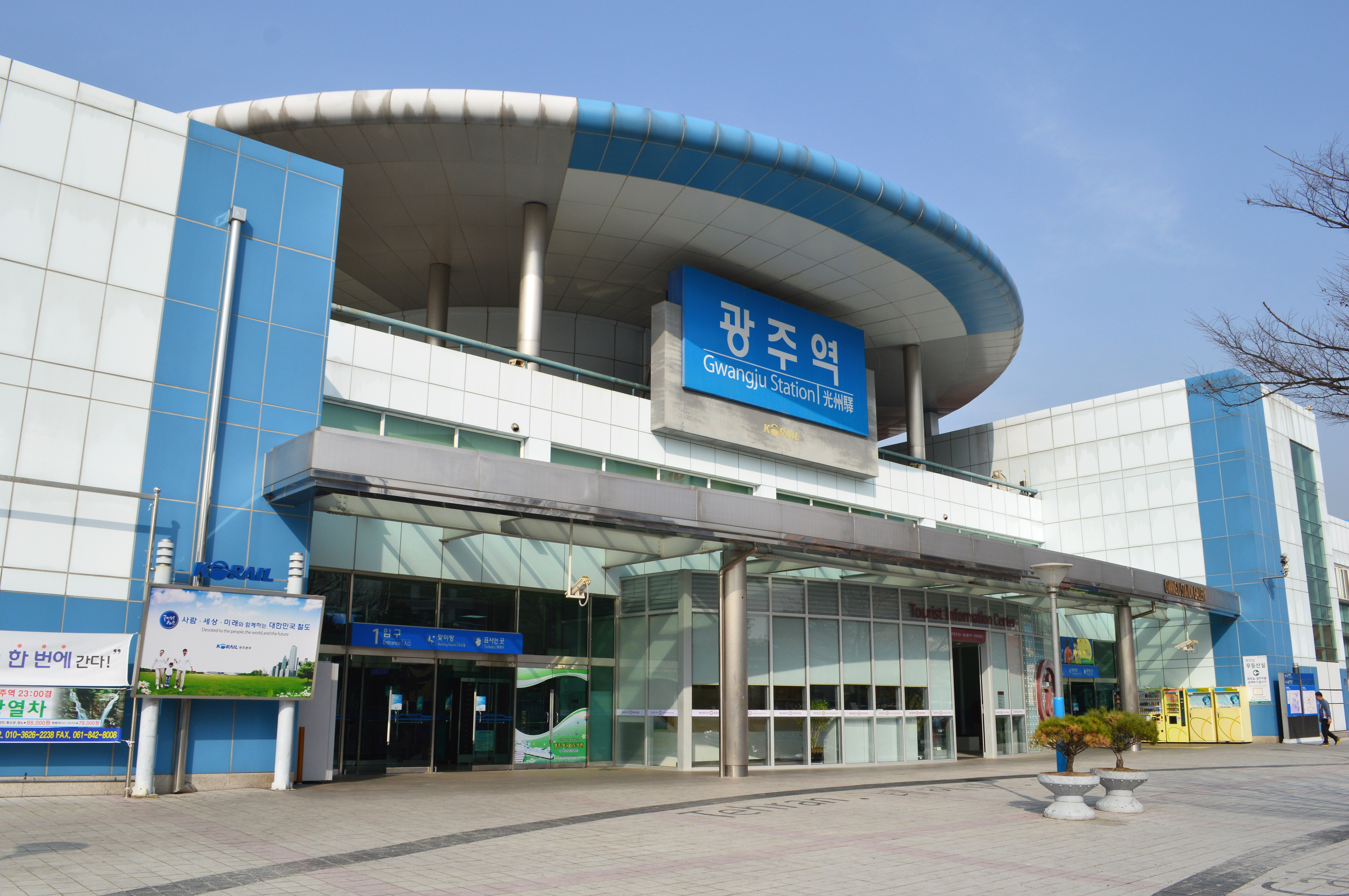 光州駅 駅舎